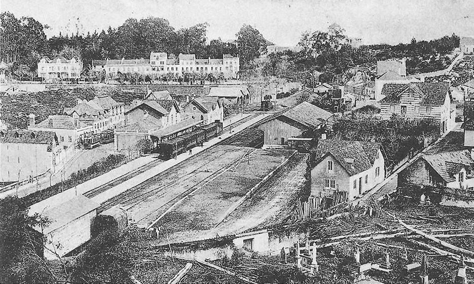 «CINTRA. (Portugal) — Estação do Caminho de Ferro e vista parcial »:« 1348» (em primeiro plano, à direita, o antigo cemitário de São Sebastião)